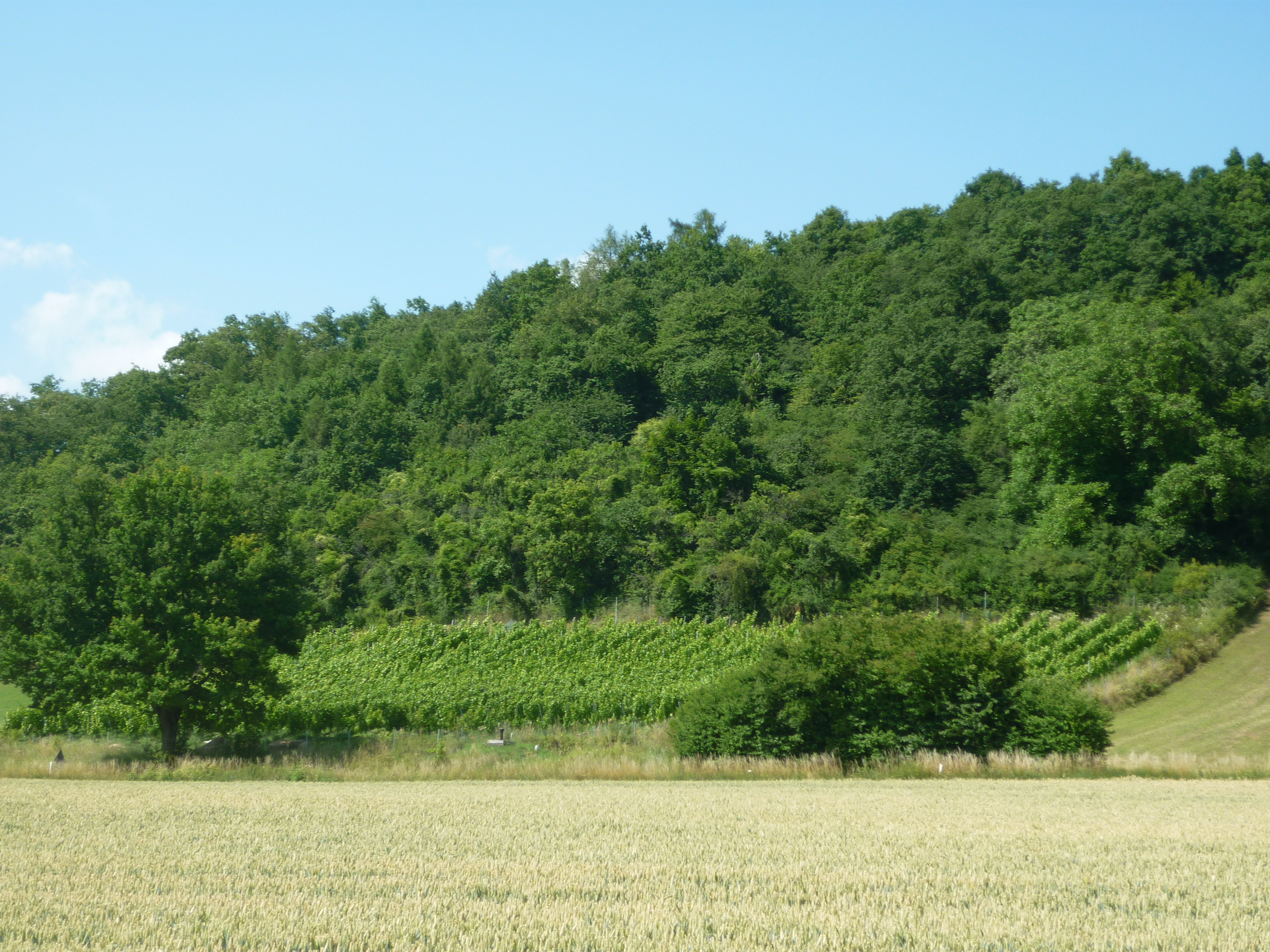 Weinanbaufläche bei Wörth an der Donau - Tiefenthal